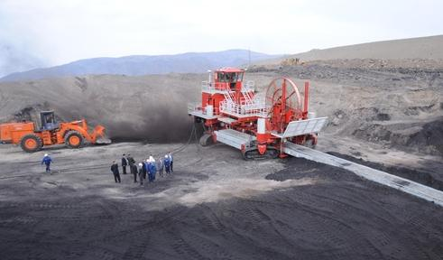 Шахта Красная горка. Тыва. Элегестинское угольное месторождение